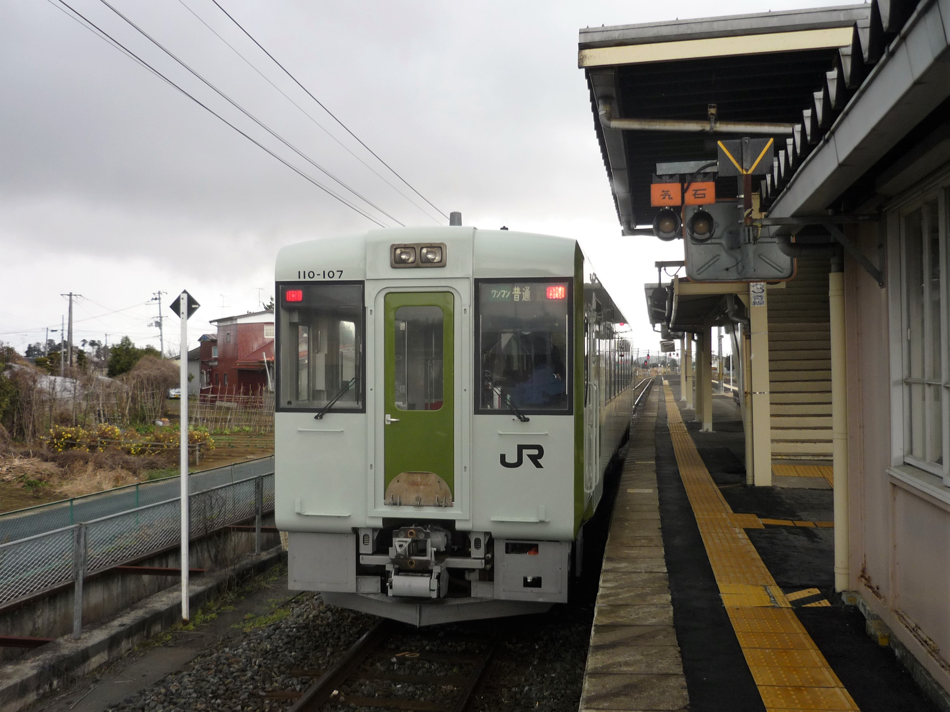 前谷地駅3番線に停車中の気仙沼線キハ110系列車（2015年12月撮影）